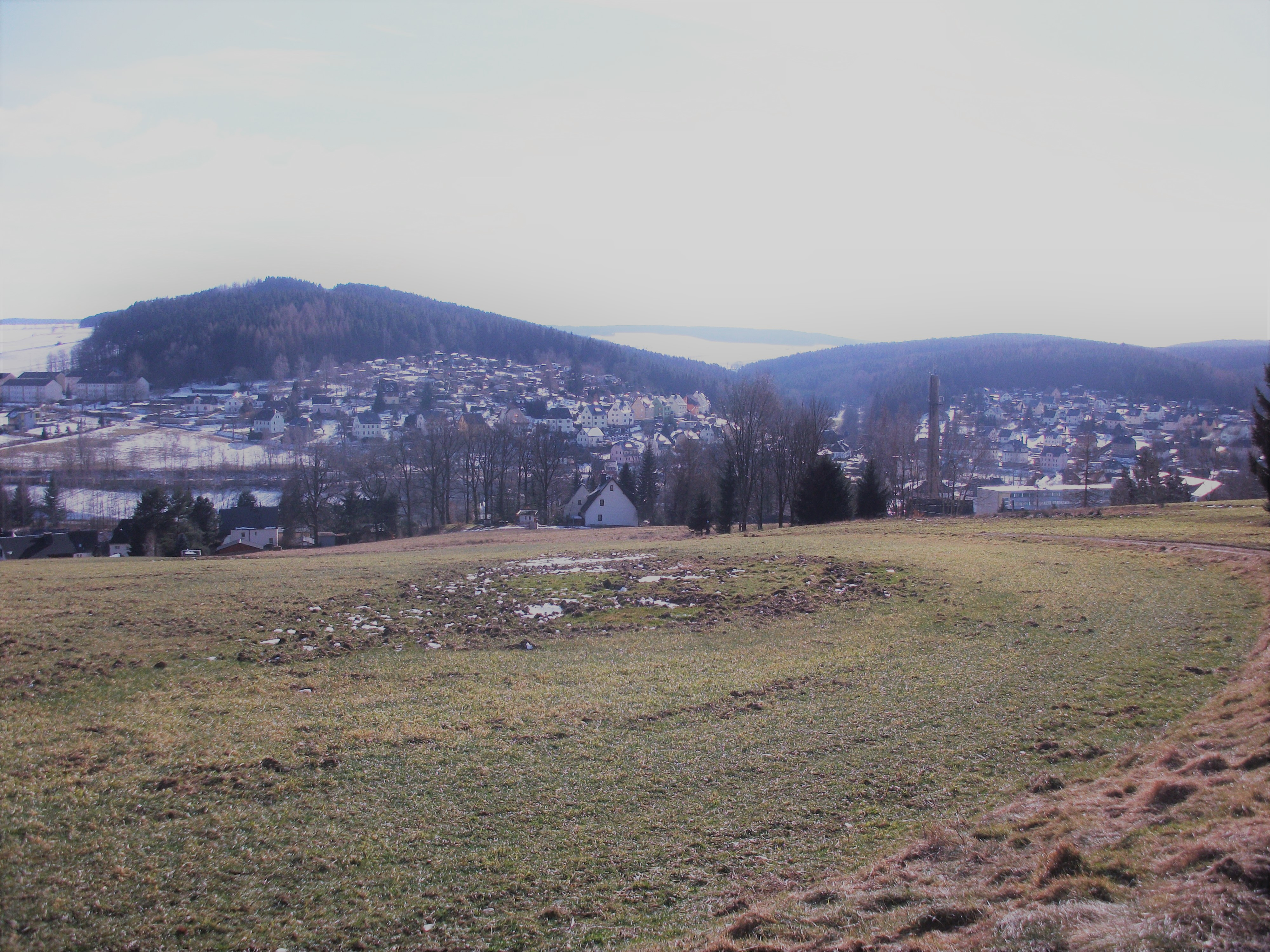 Ortsansicht Gornsdorf